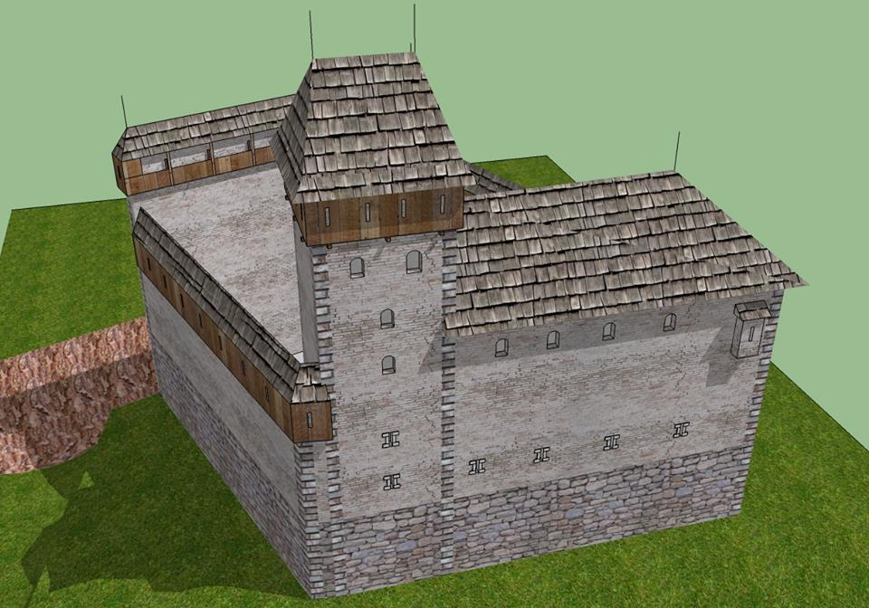 Grad Raka 13 stoletje